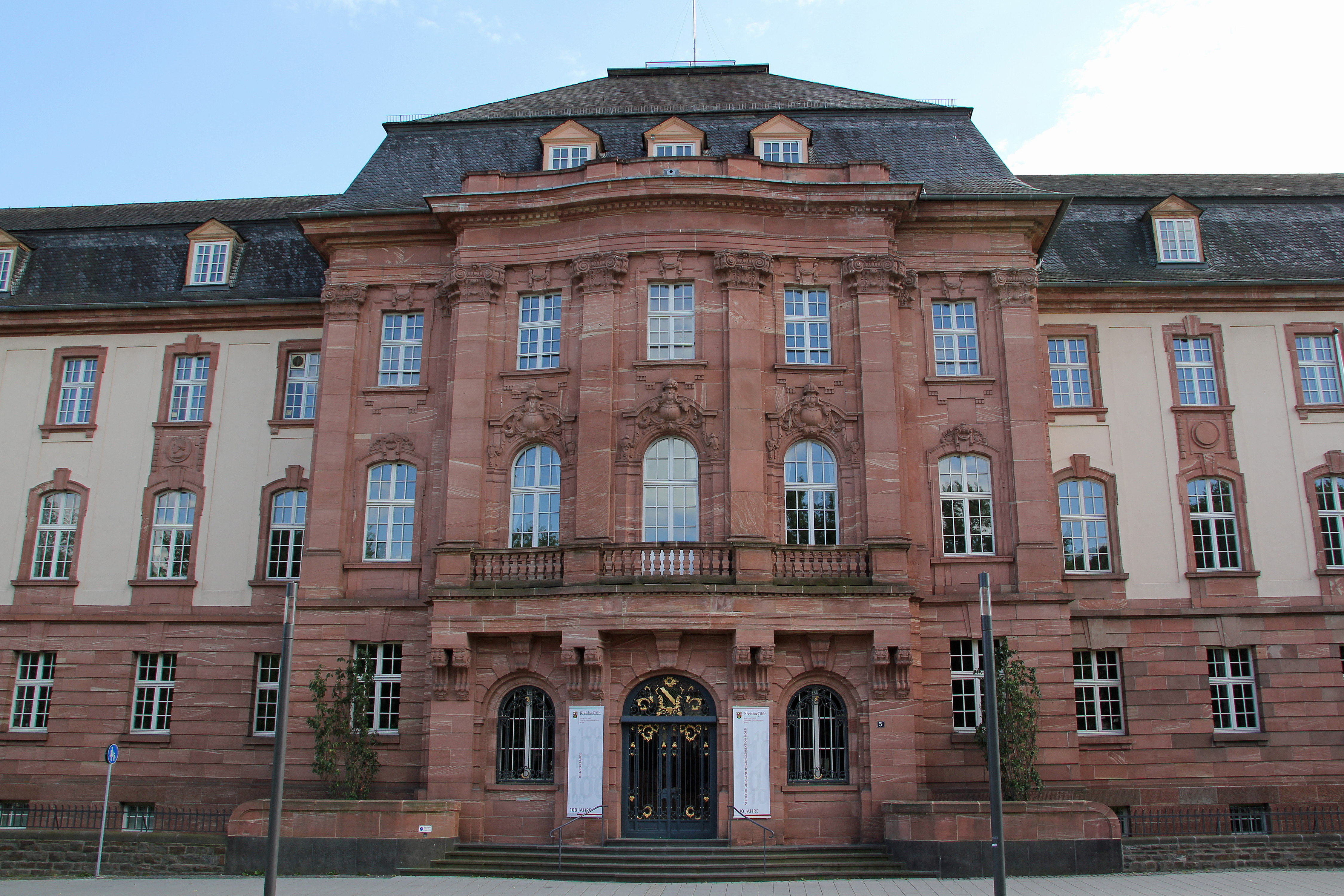 Koblenz im Buga-Jahr 2011 - Der Mittelrisalit am Oberpräsidium der Rheinprovinz